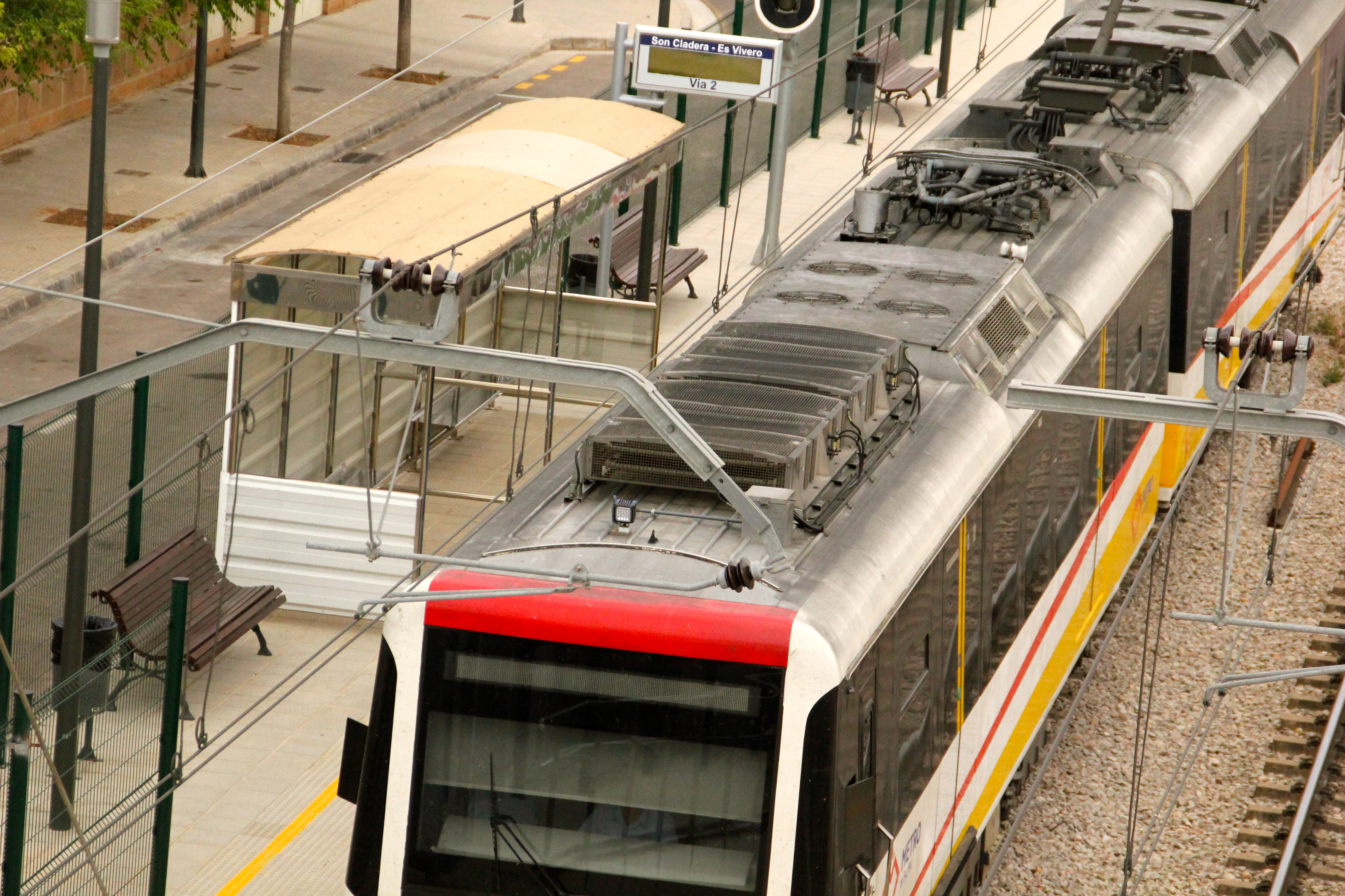 estació son cladera-es vivero